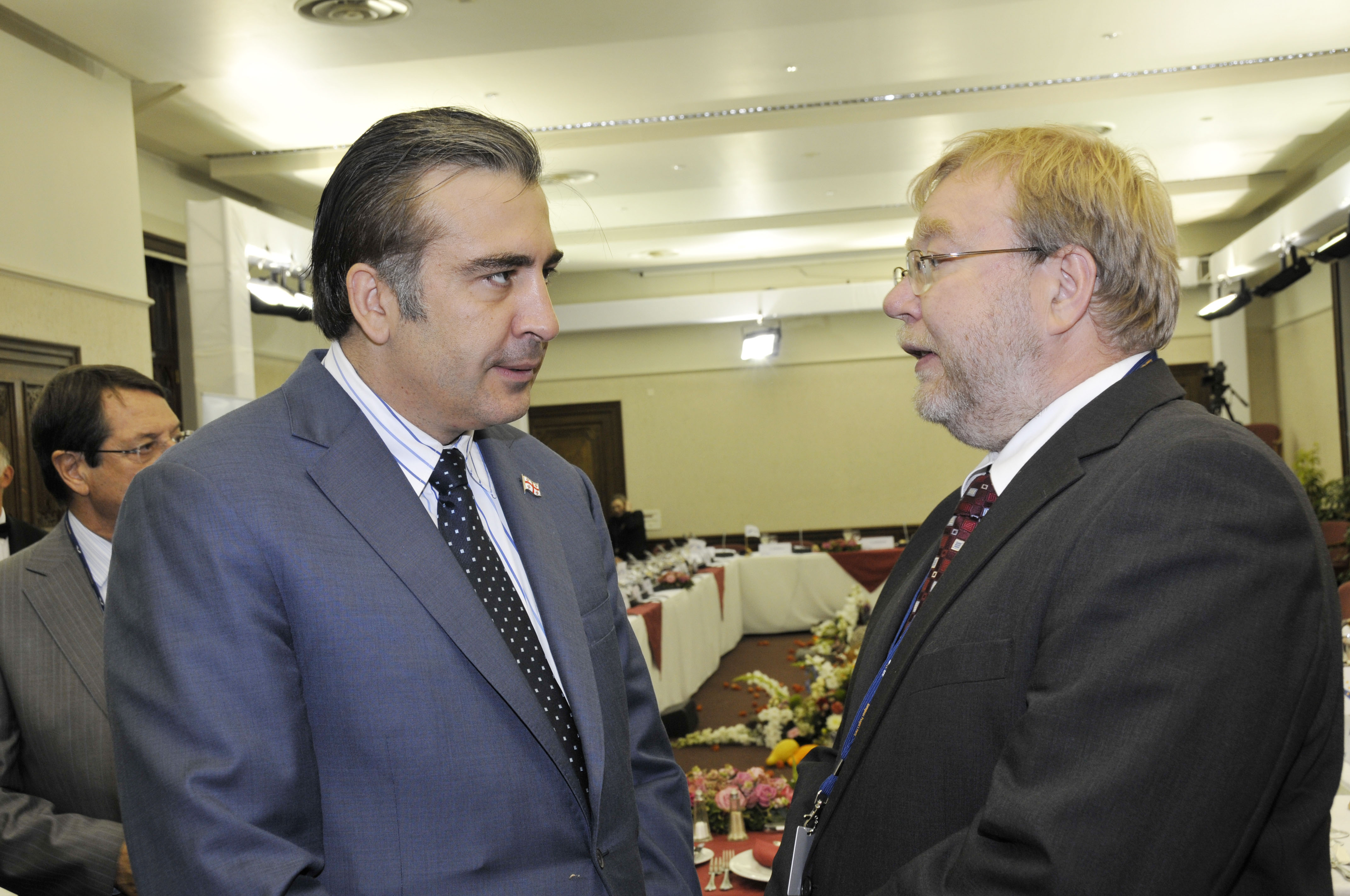 Mikheil Saakashvili and Mart Laar at EPP Summit September 2010